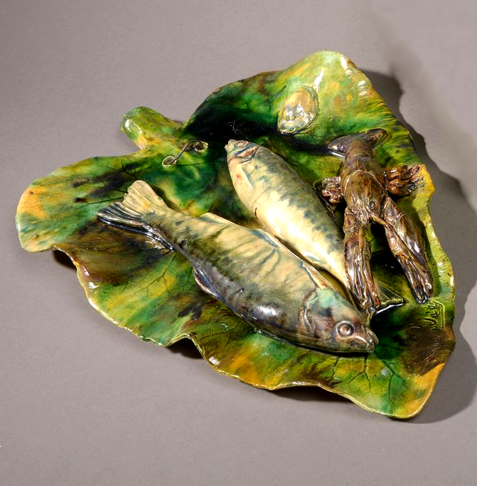 Plat en forme de feuille, Alfred Renoleau -1854-1930, France